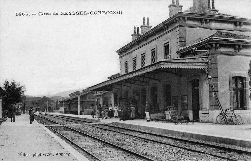 Carte postale ancienne représentant l'intérieur de la gare de Seyssel - Corbonod, avec la ligne à deux voies, les quais et le bâtiment voyageurs.